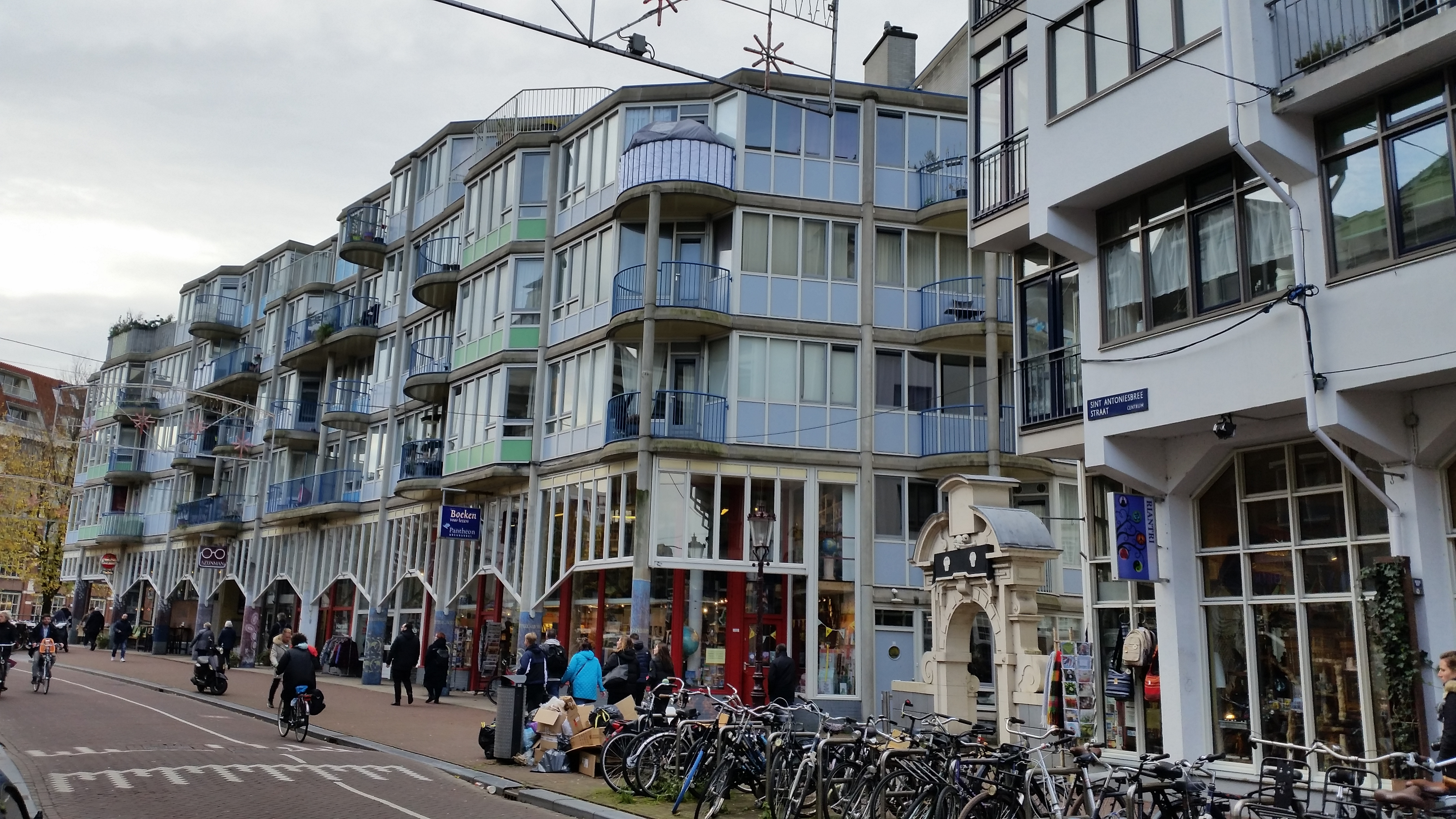 Fotoreportage van het gebouw Pentagon aan het gelijknamige plein in Amsterdam-Centrum gemaakt in november 2019